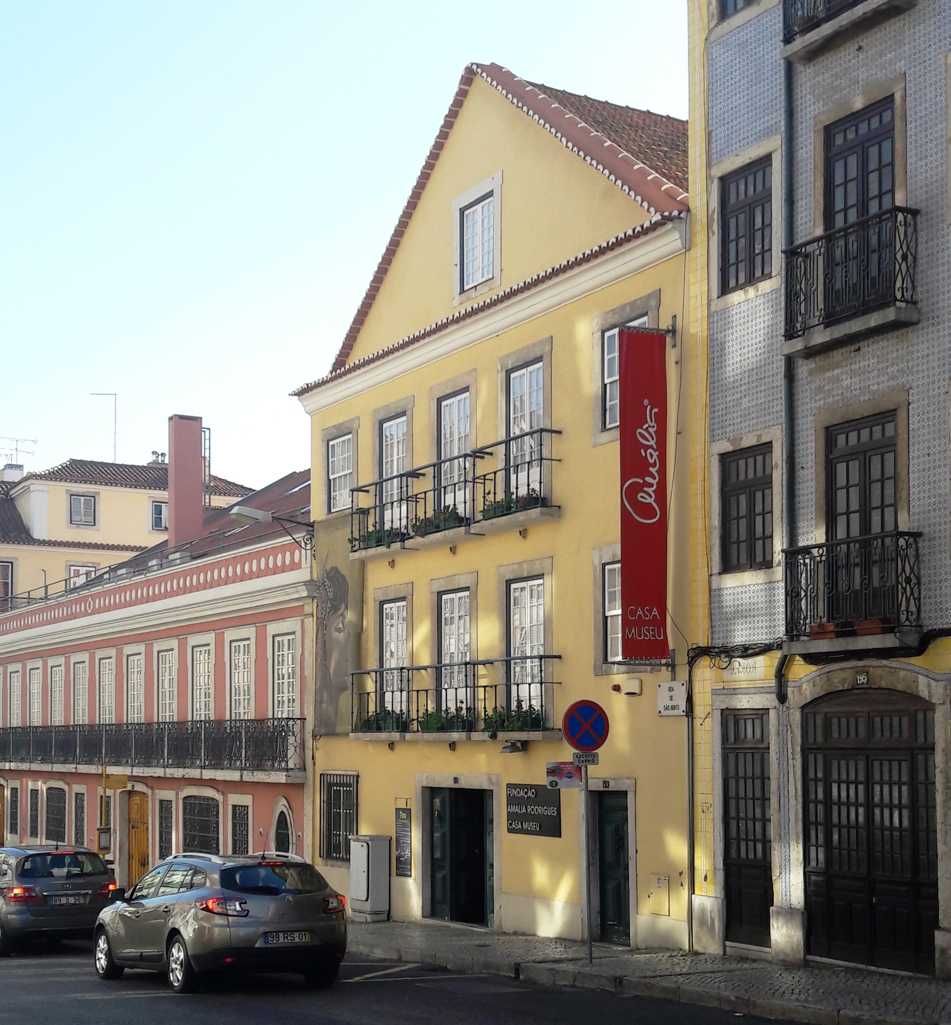 Sede da Fundação Amália Rodrigues, em Lisboa.